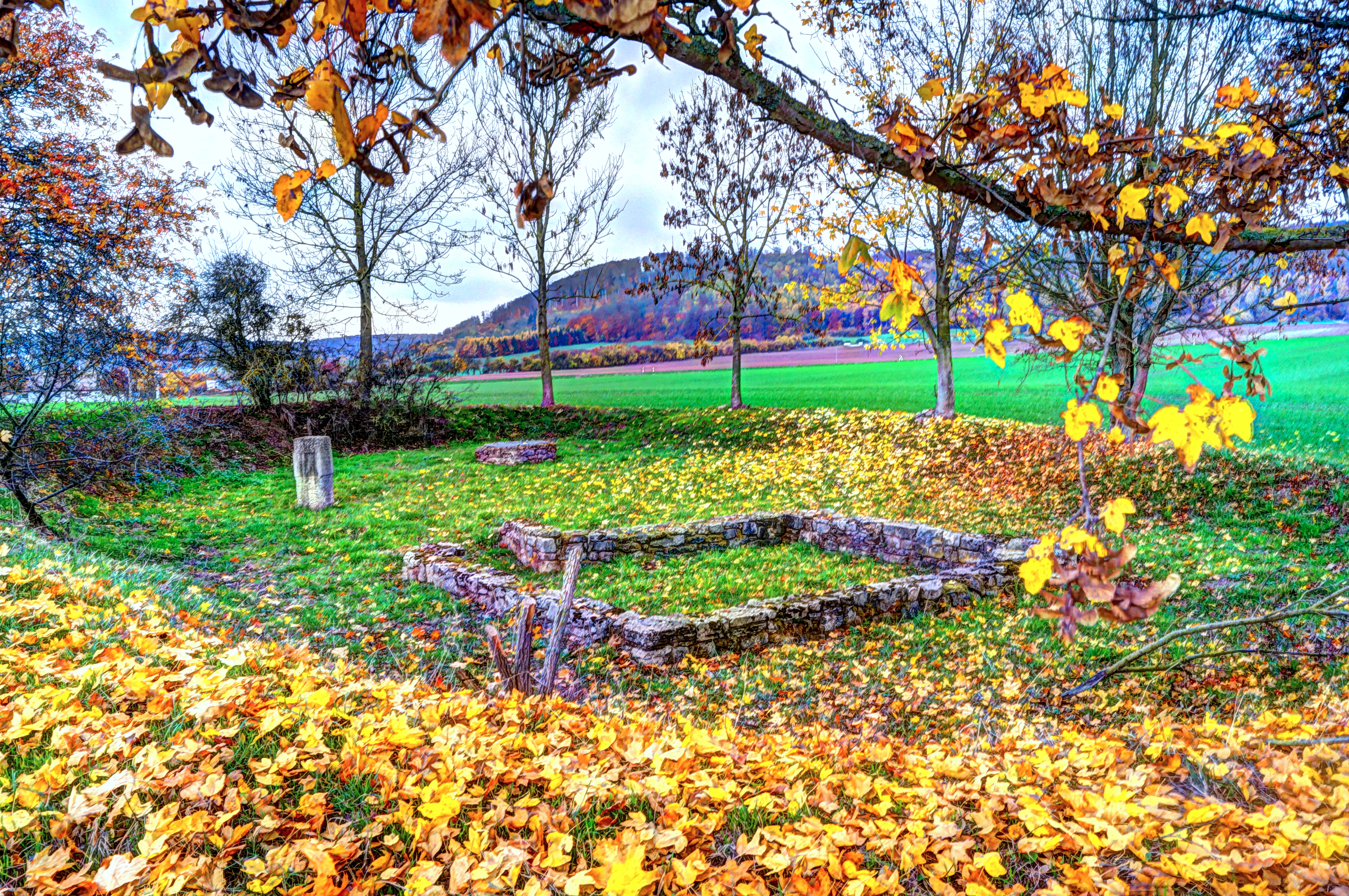 Überblick über die Grabungsstelle der Wüstung Hugenworbis (im Hintergrund der Klei)